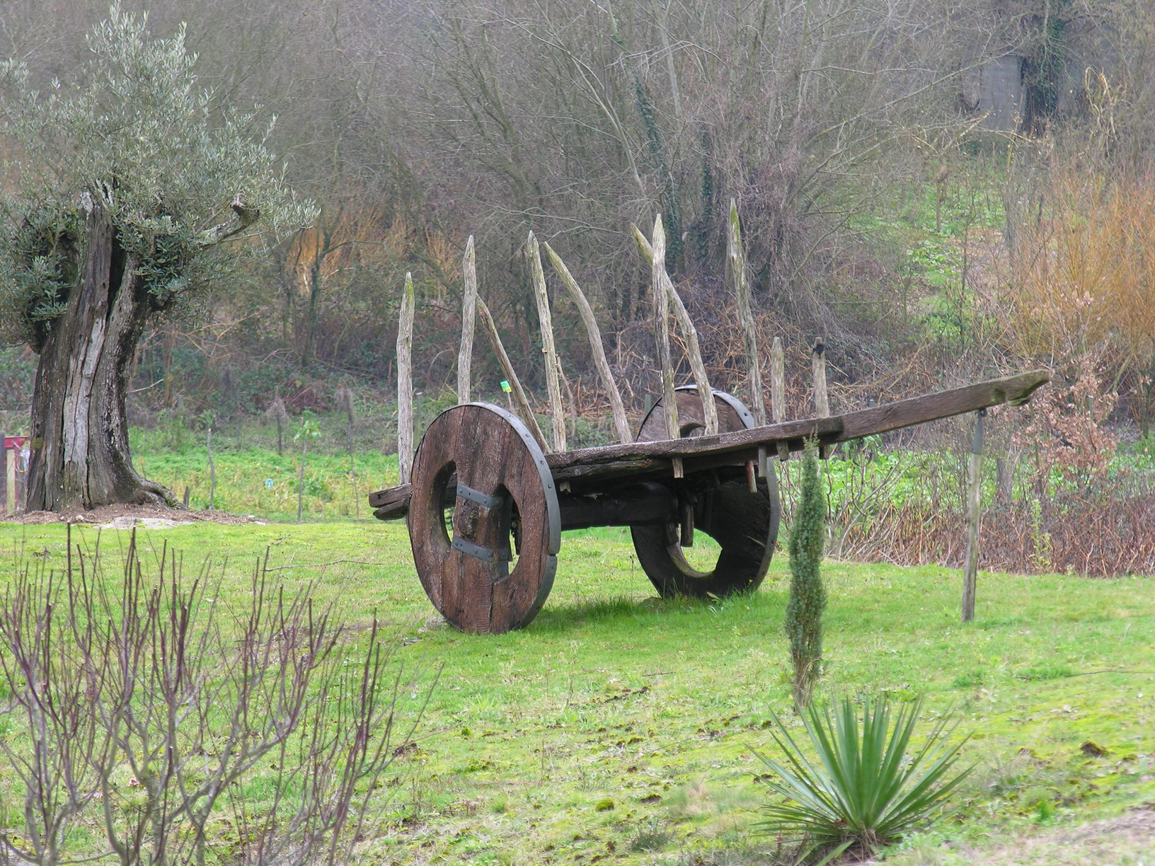 self made. Arnoia - Ribadavia - Ourense - Galicia - Spain